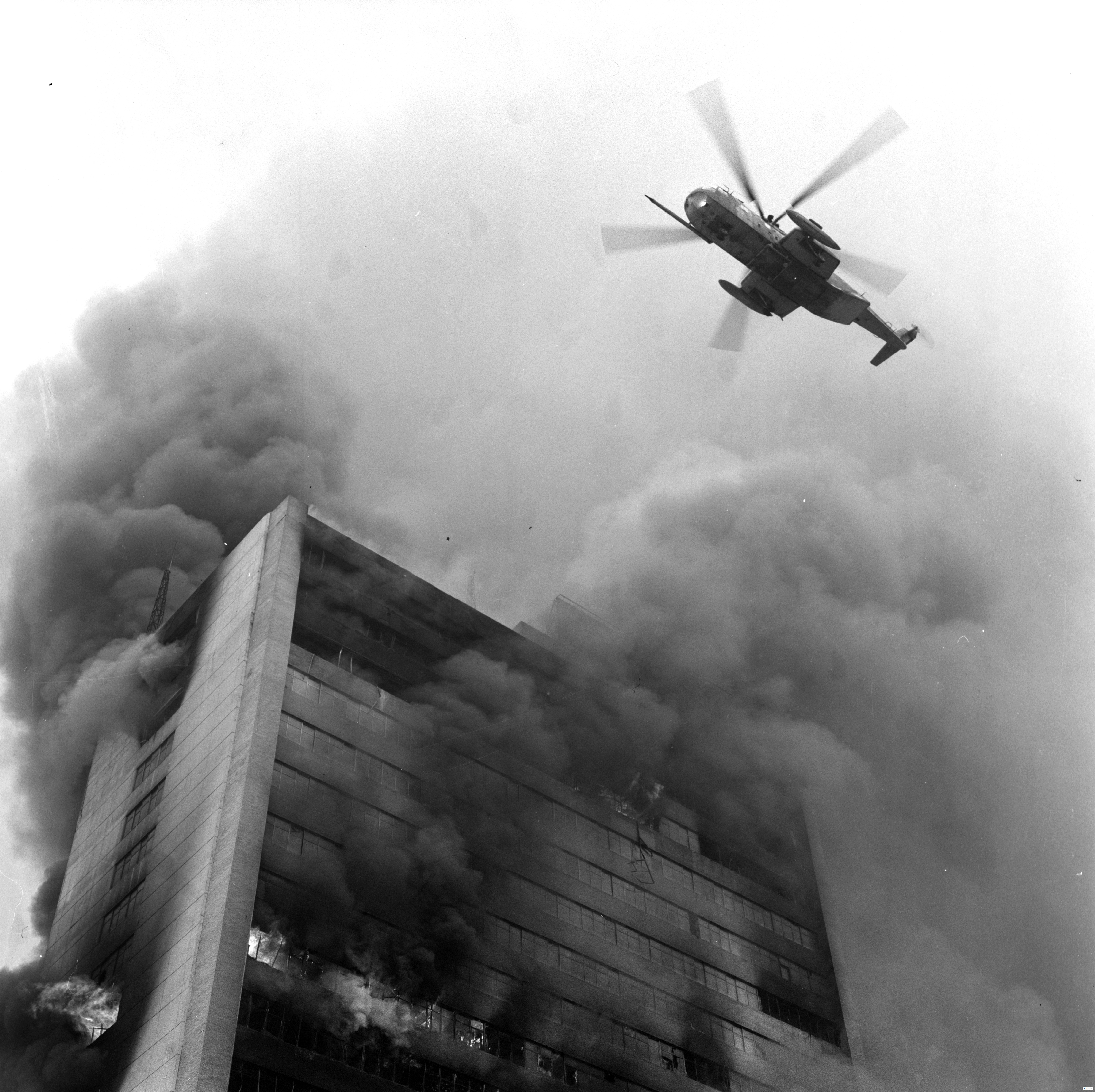 서울특별시 소방재난본부 소장 사진. photos of Seoul Metropolitan Fire & Disaster Headquarters. 이 파일은 크리에이티브 커먼즈 저작자표시-동일조건변경허락 4.0 국제 라이선스로 배포됩니다. 단 누구인지 구별 가능한 특정 인물이 사진에 포함되어 있을 경우 사용 전에 서울특별시 소방재난본부 및 해당 인물의 승인을 받으셔야합니다. 감사합니다. evidence of permission